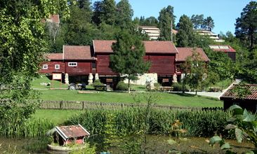 Fusdallåven ble gjenreist på Asker museum i 1991 og huser utstillingslokaler, kafeteria og administrasjon.